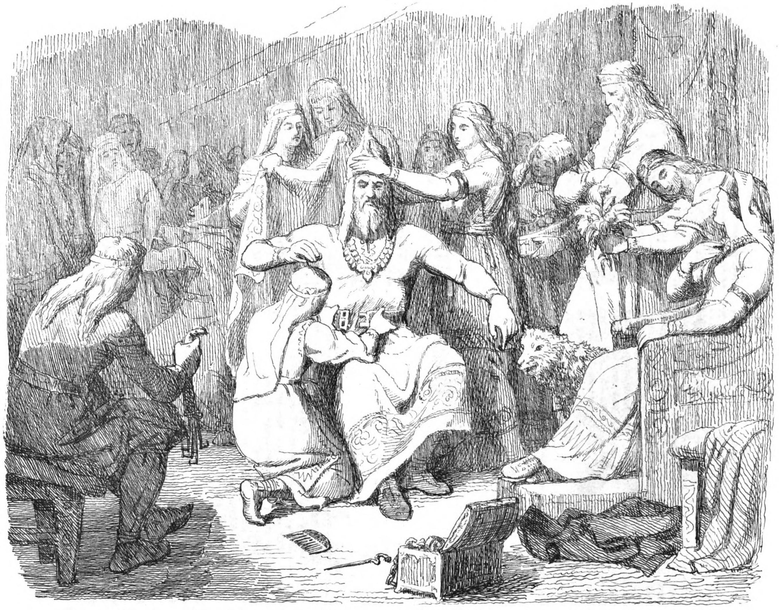 Litografi efter Hammar-hämtningen II. Thor klädes till brud av Mårten Eskil Winge.